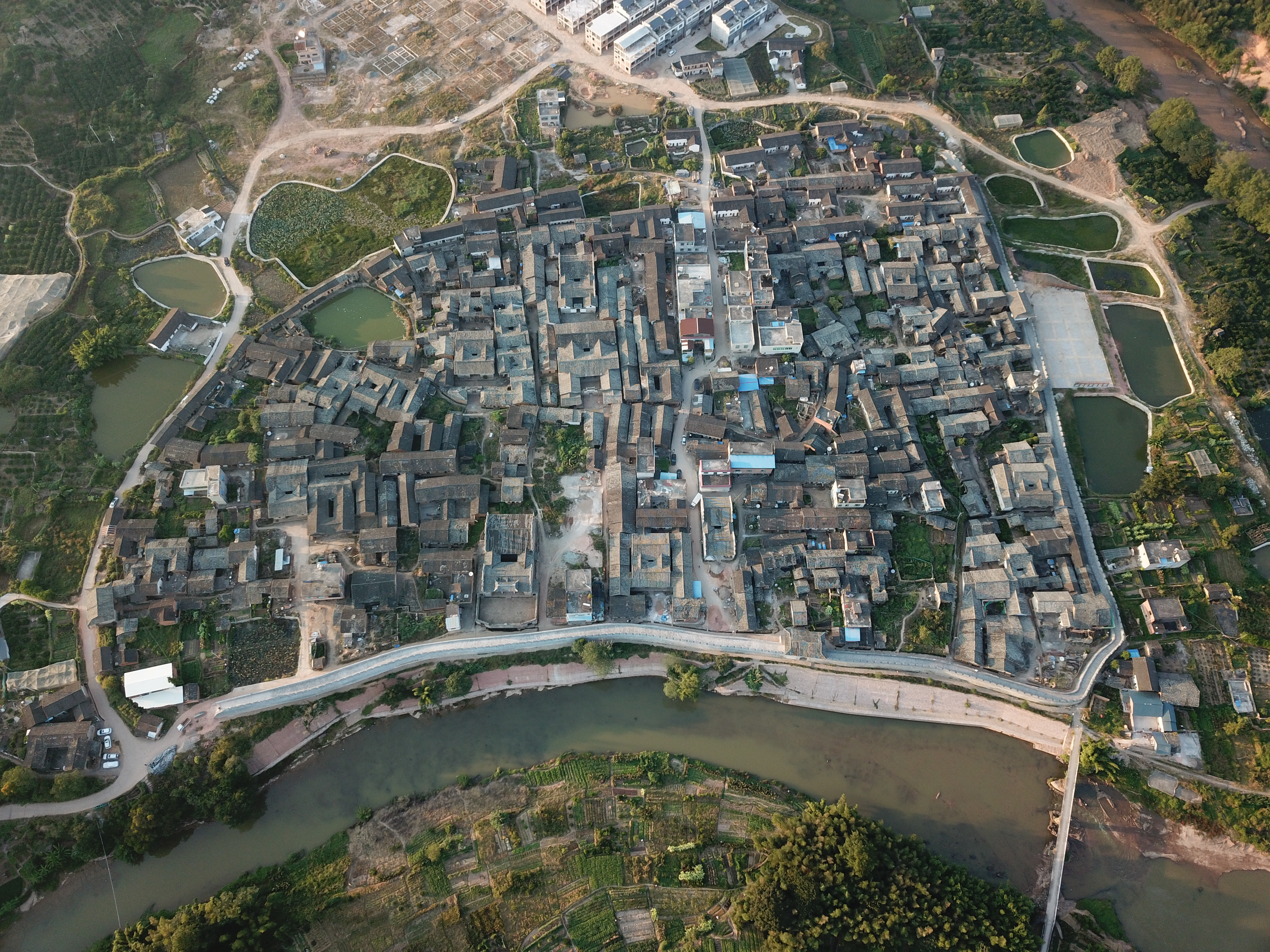 羊角水堡